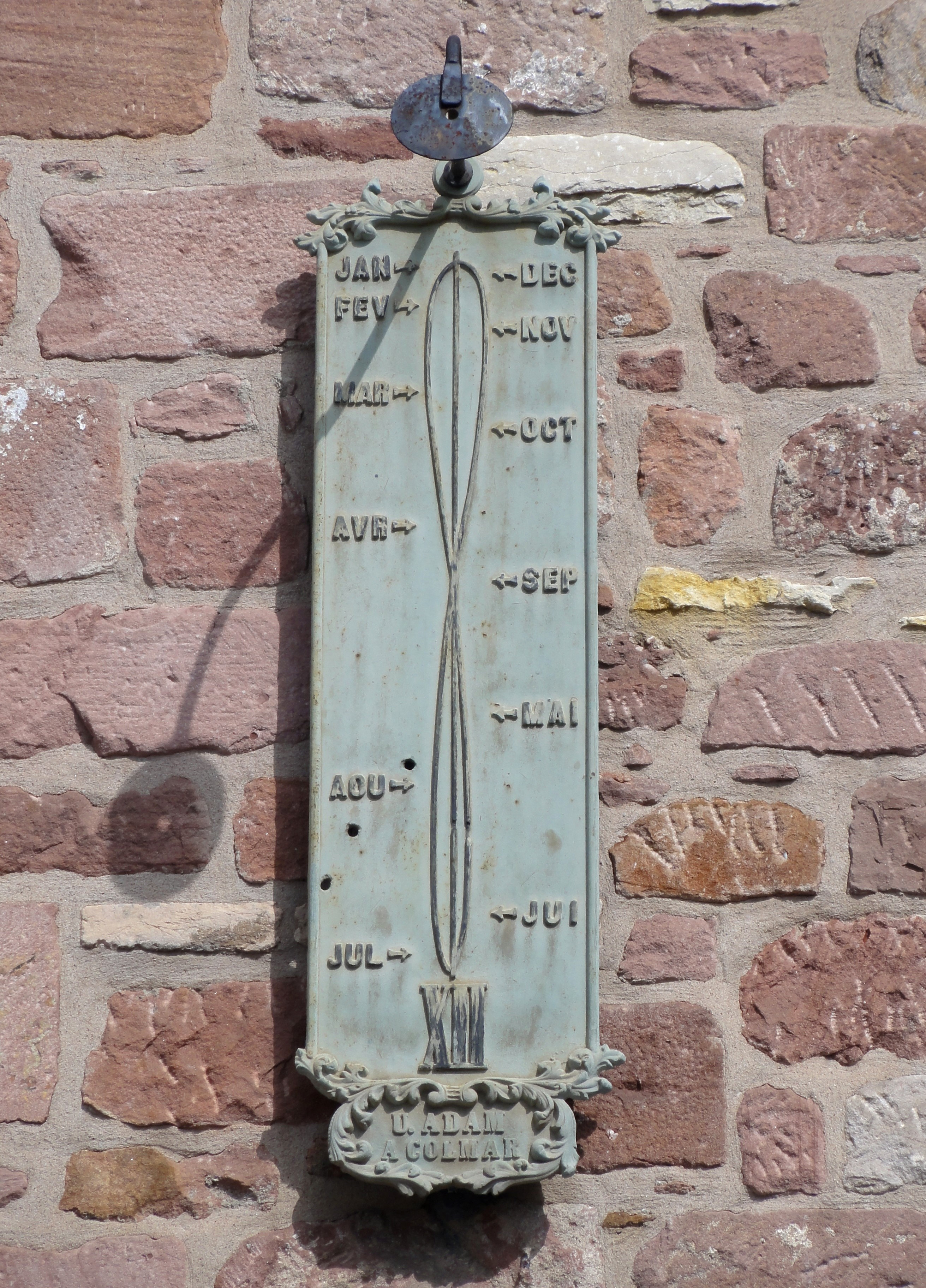 Alsace, Haut-Rhin, Chapelle Saints-Félix-et-Régule de Kientzheim (IA68004078), place de l'Abbé-Buchinger. Cadran solaire.